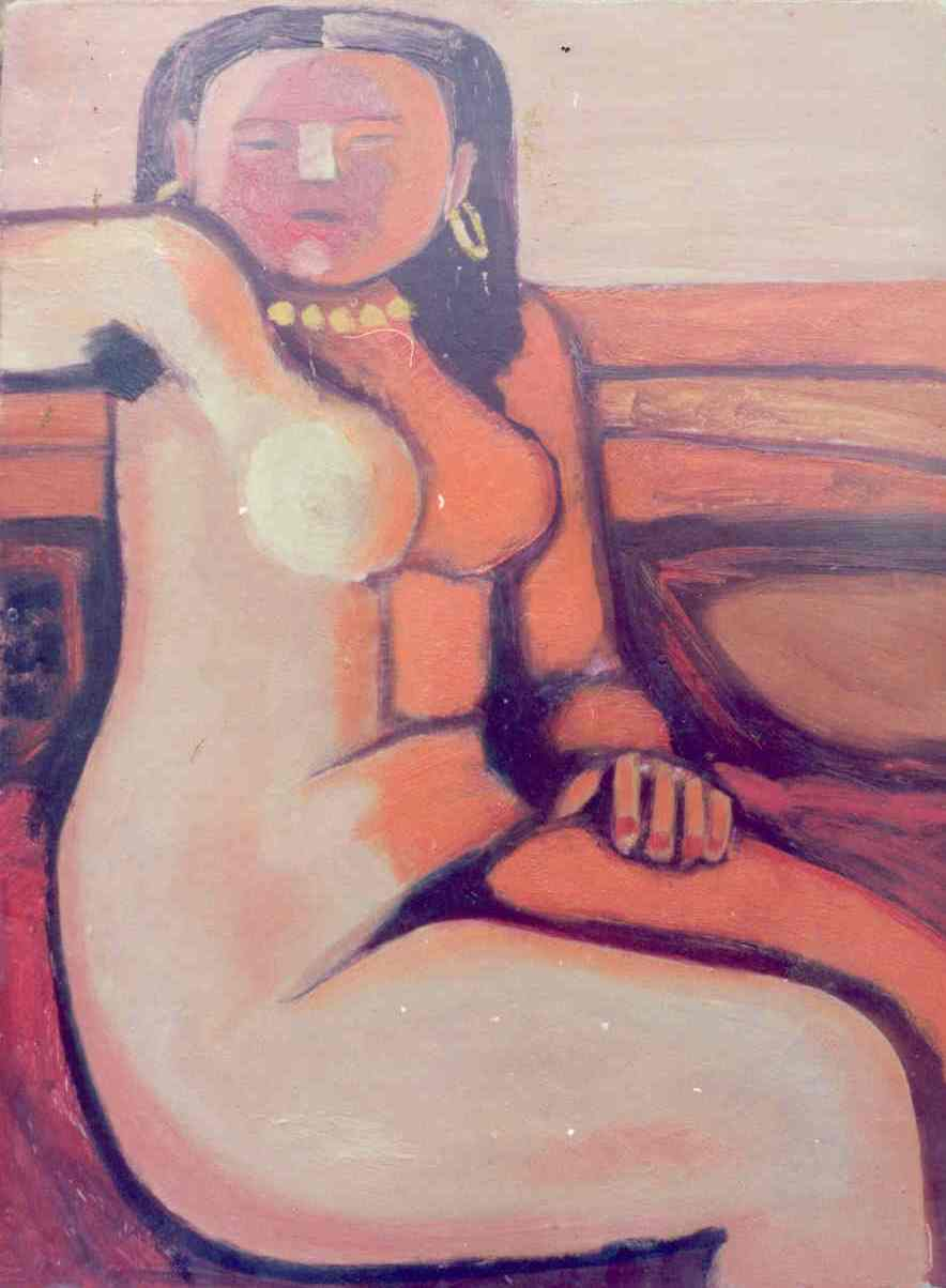 Женщина с серьгой.1996 г., двп.масло, 54х73.5.